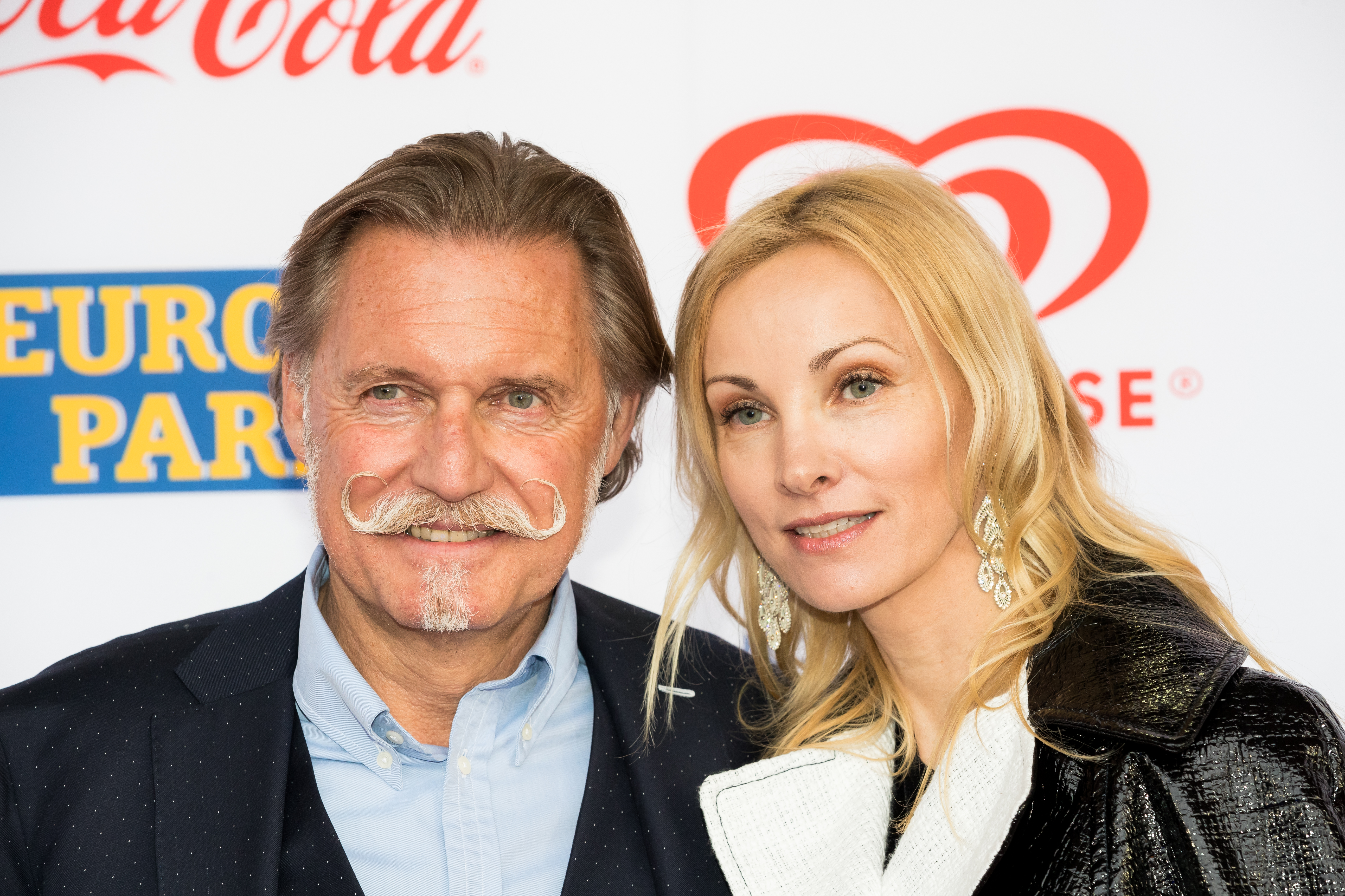 Ingo Lenßen during Radio Regenbogen Award 2019 at Europapark, Rust, Baden-Württemberg, Germany on 2019-04-12, Photo: Sven Mandel